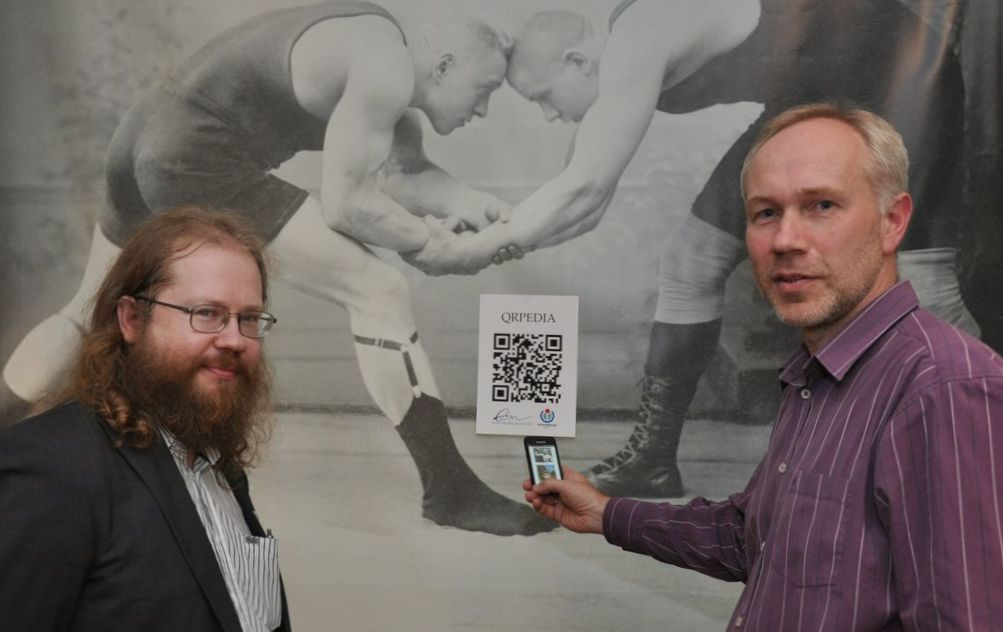 Spordimuuseumi direktor Daimar Lell (paremal) koos MTÜ Wikimedia Eesti esindajaga katsetamas esimest QR-koodi 8. juunil 2012, kui Spordimuuseum võtab esimese Eesti muuseumina kasutusele QRpedia süsteemi.